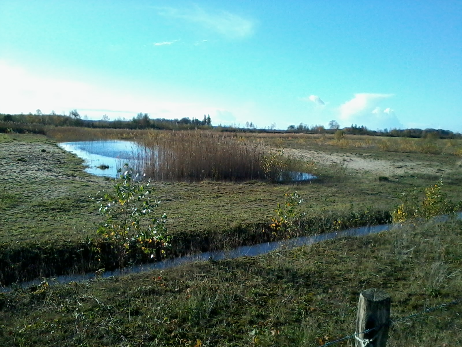 Honderd Morgen near Vught